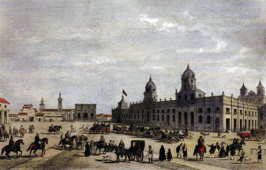 Plaza de la Independencia en Santiago de Chile, primera mitad del siglo XIX.